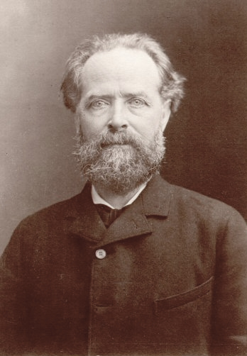 Portrait d'Elisée Reclus réalisé par Nadar. Photographie fournie gracieusement par Philippe Malburet, descendant d'E. Reclus.